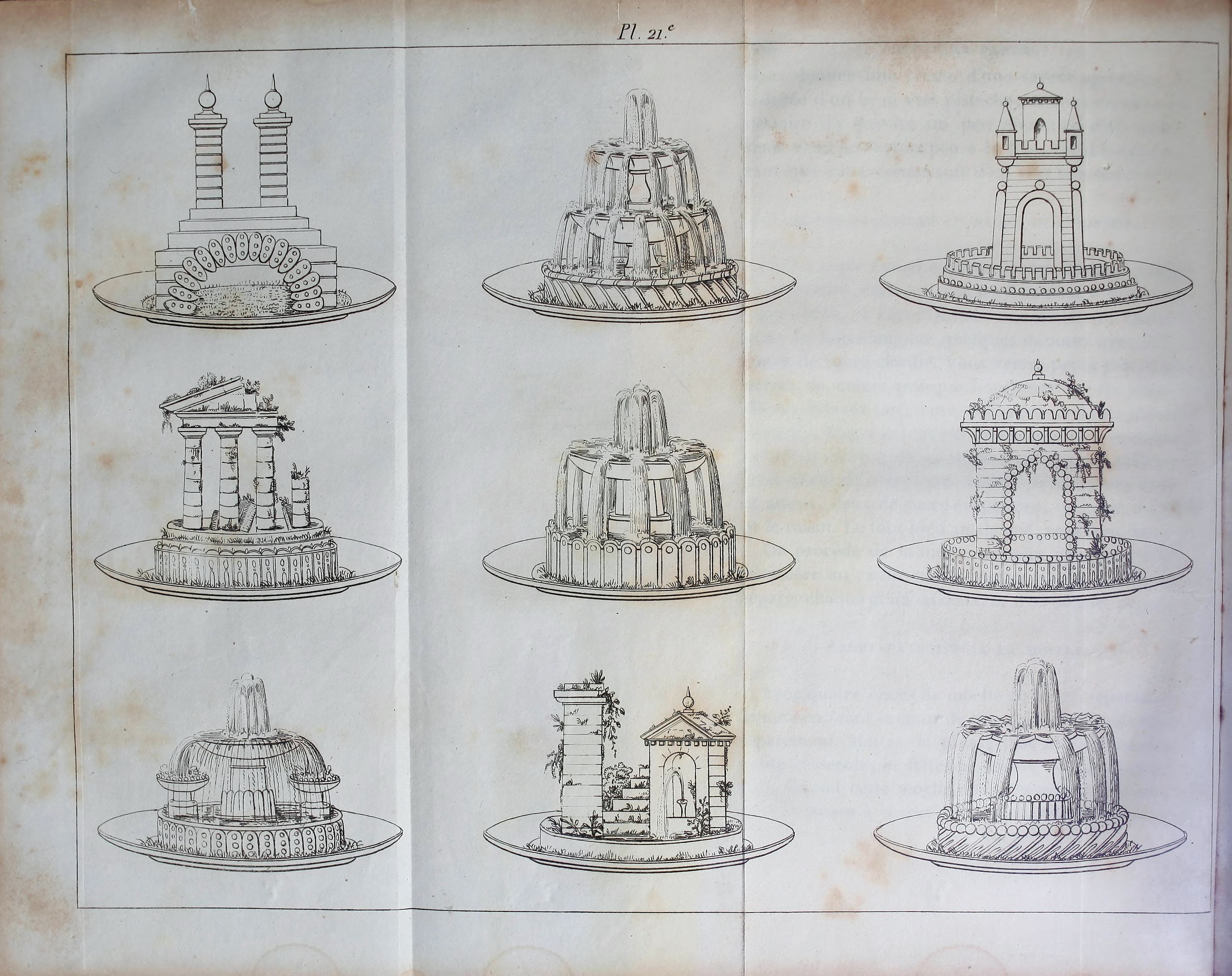 Illustration du Cuisinier parisien.